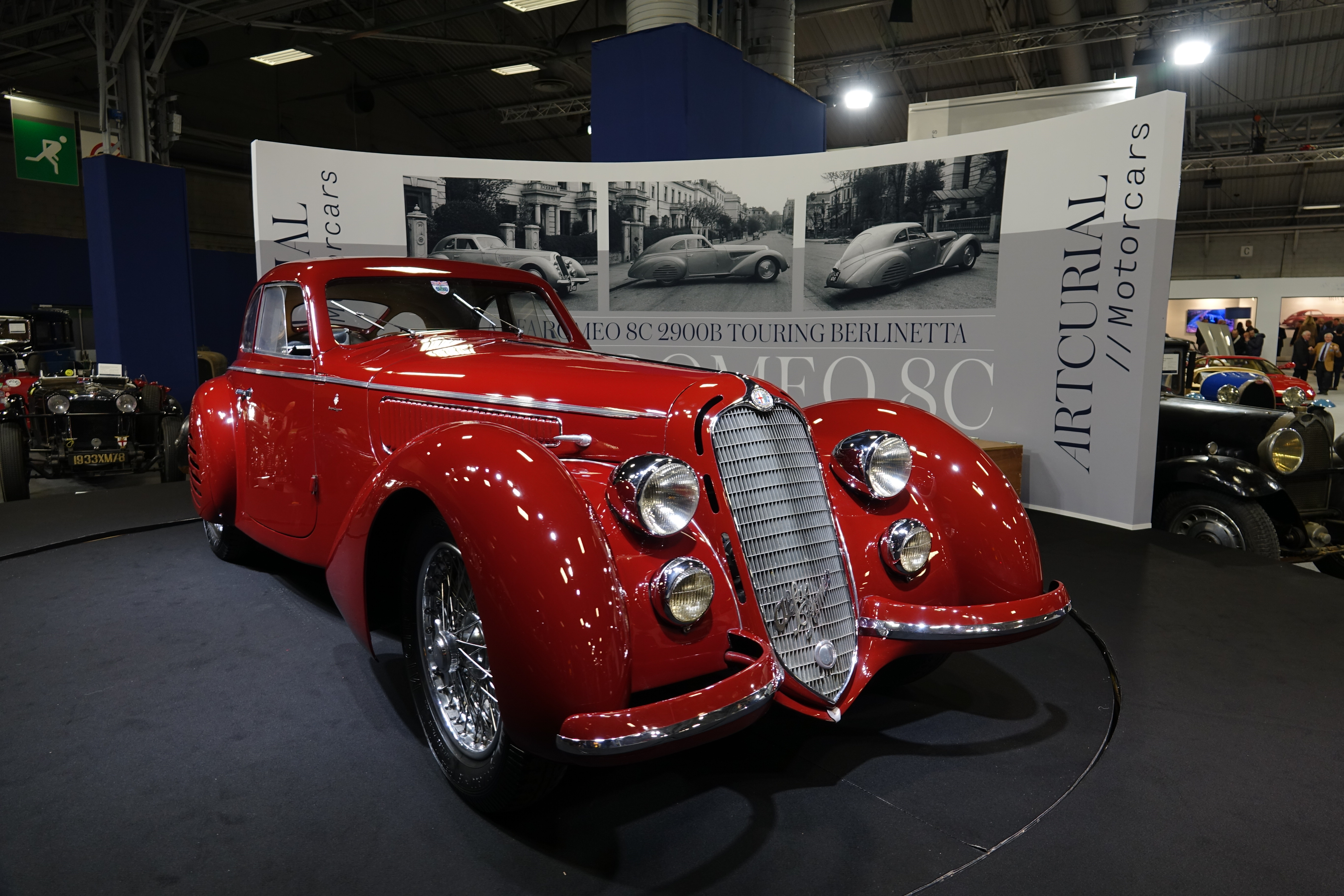 Alfa Romeo 8C 2900B Touring Berlinetta à Rétromobile 2019